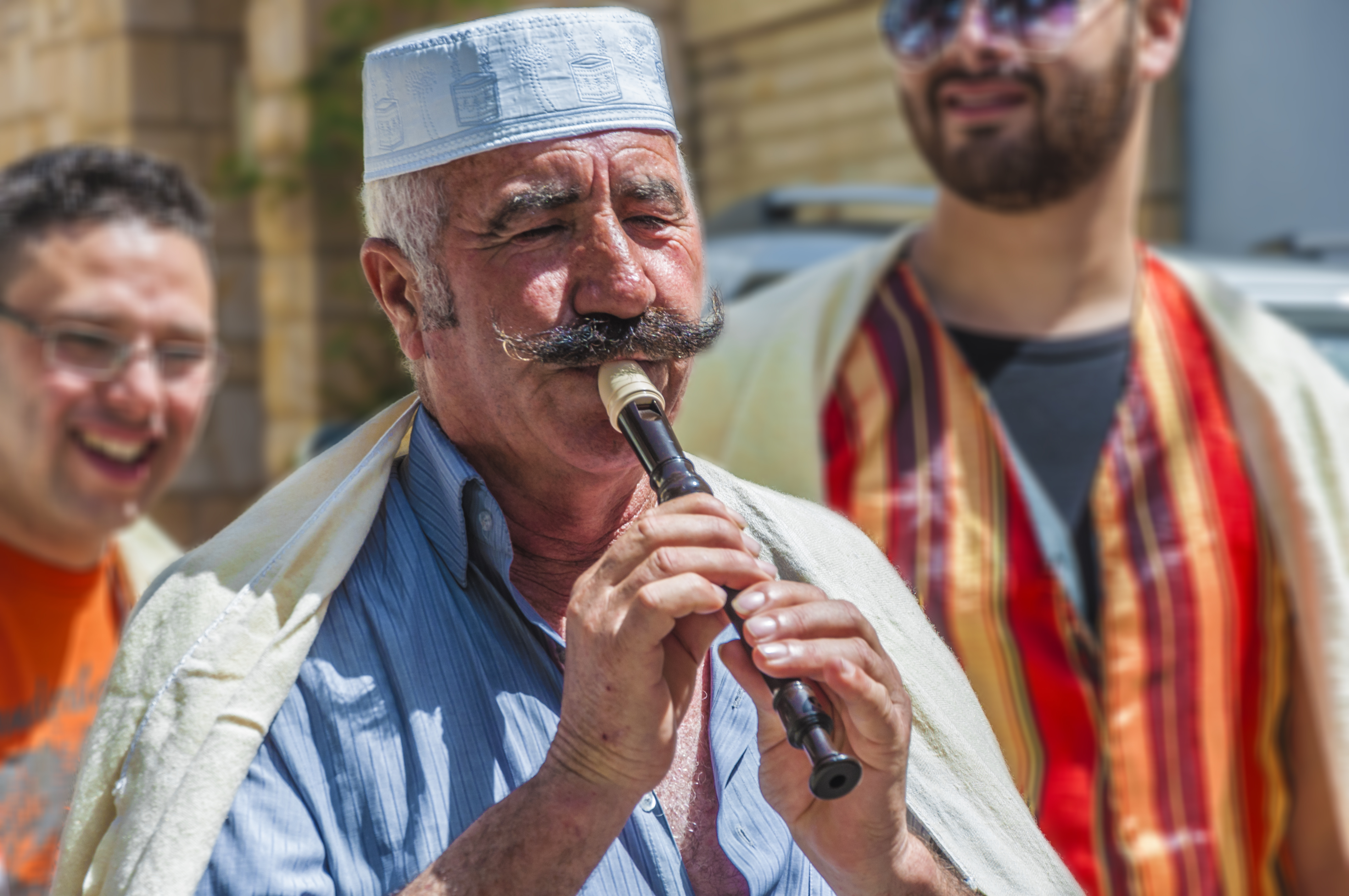 tradition kabyle bejaia algerie This is an image with the theme "Play" from: Algeria